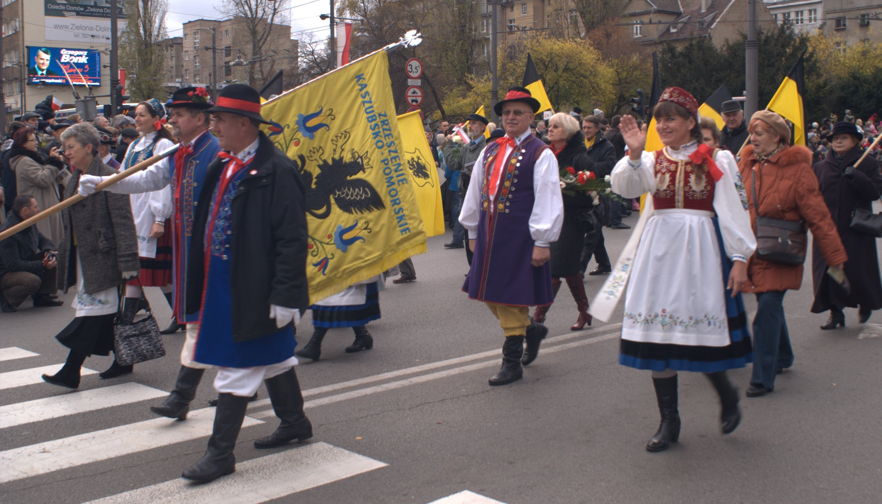 Gdyńska Parada Niepodległości 11 listopada 2010 r. Sztandar Zrzeszenia Kaszubsko-Pomorskiego.